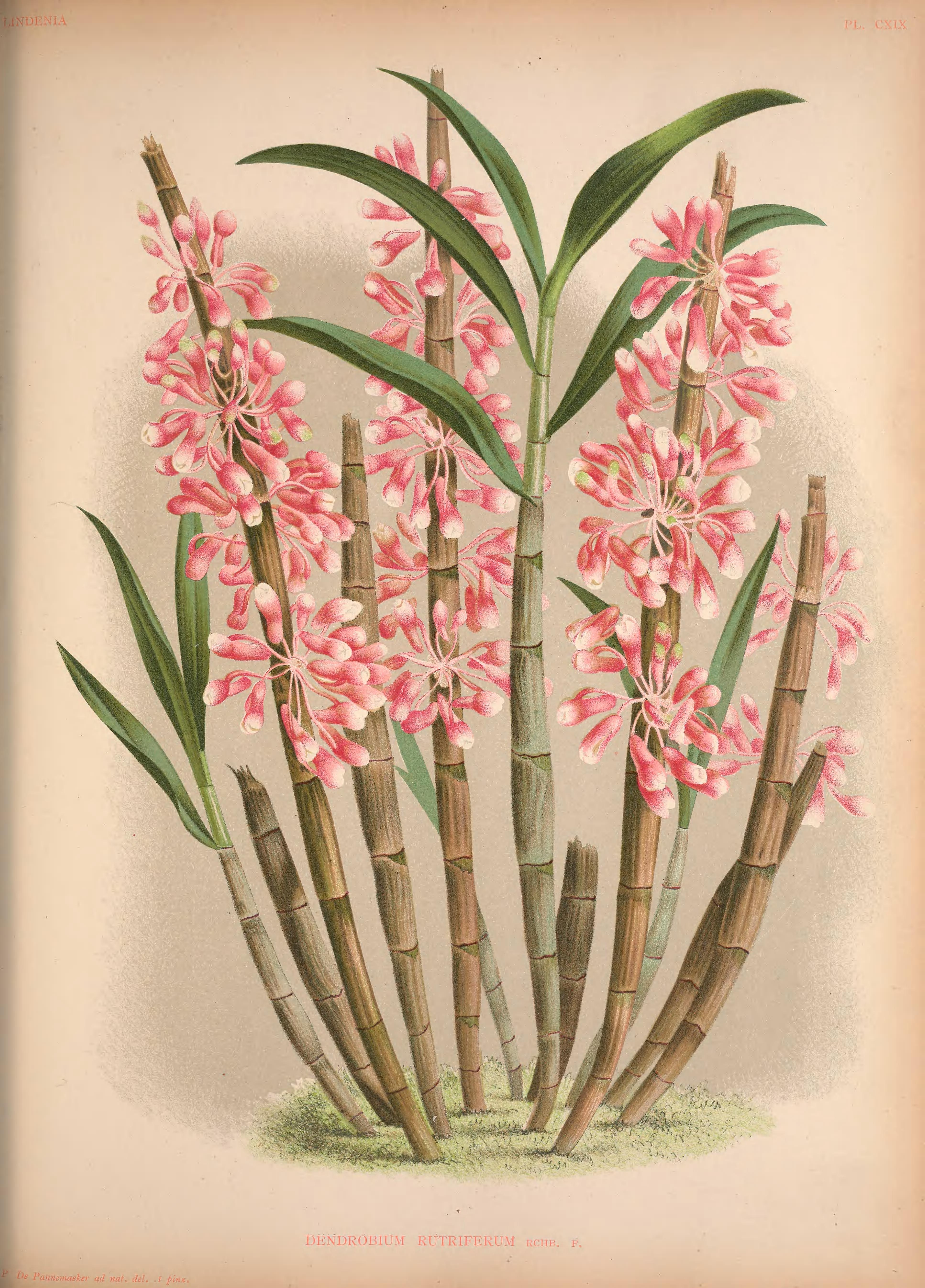 Lindenia : iconographie des Orchidées